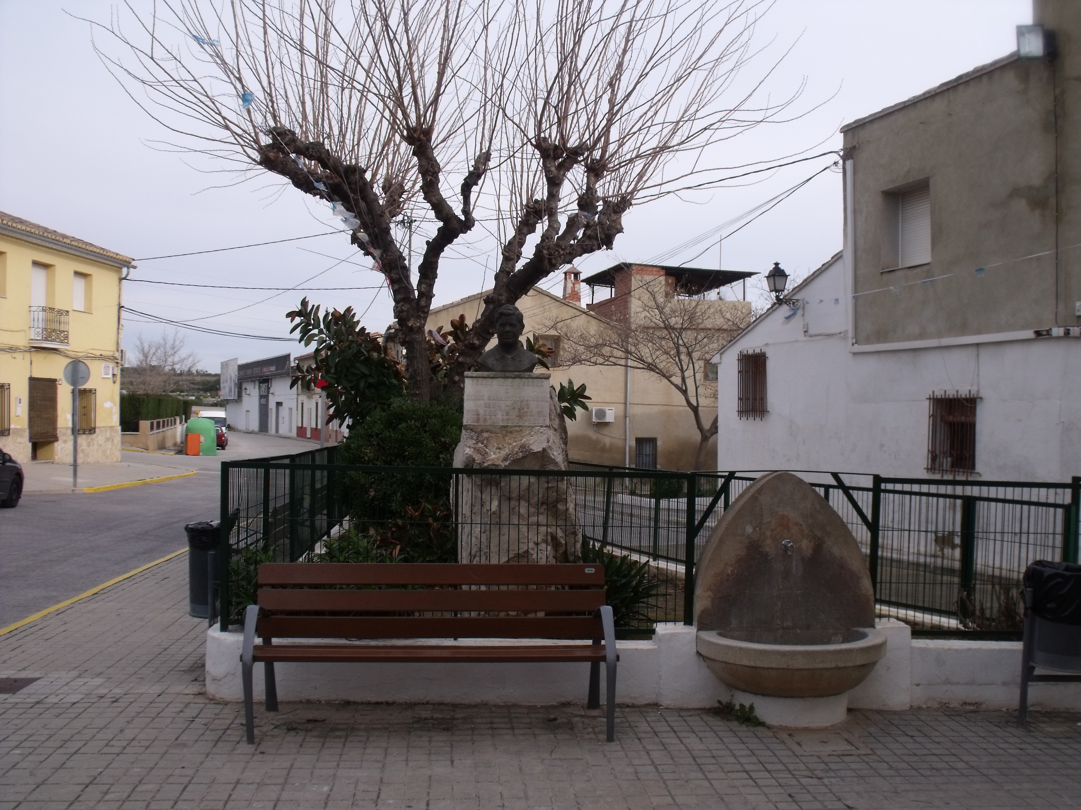 Monumento conmemorativo de un vecino del pueblo